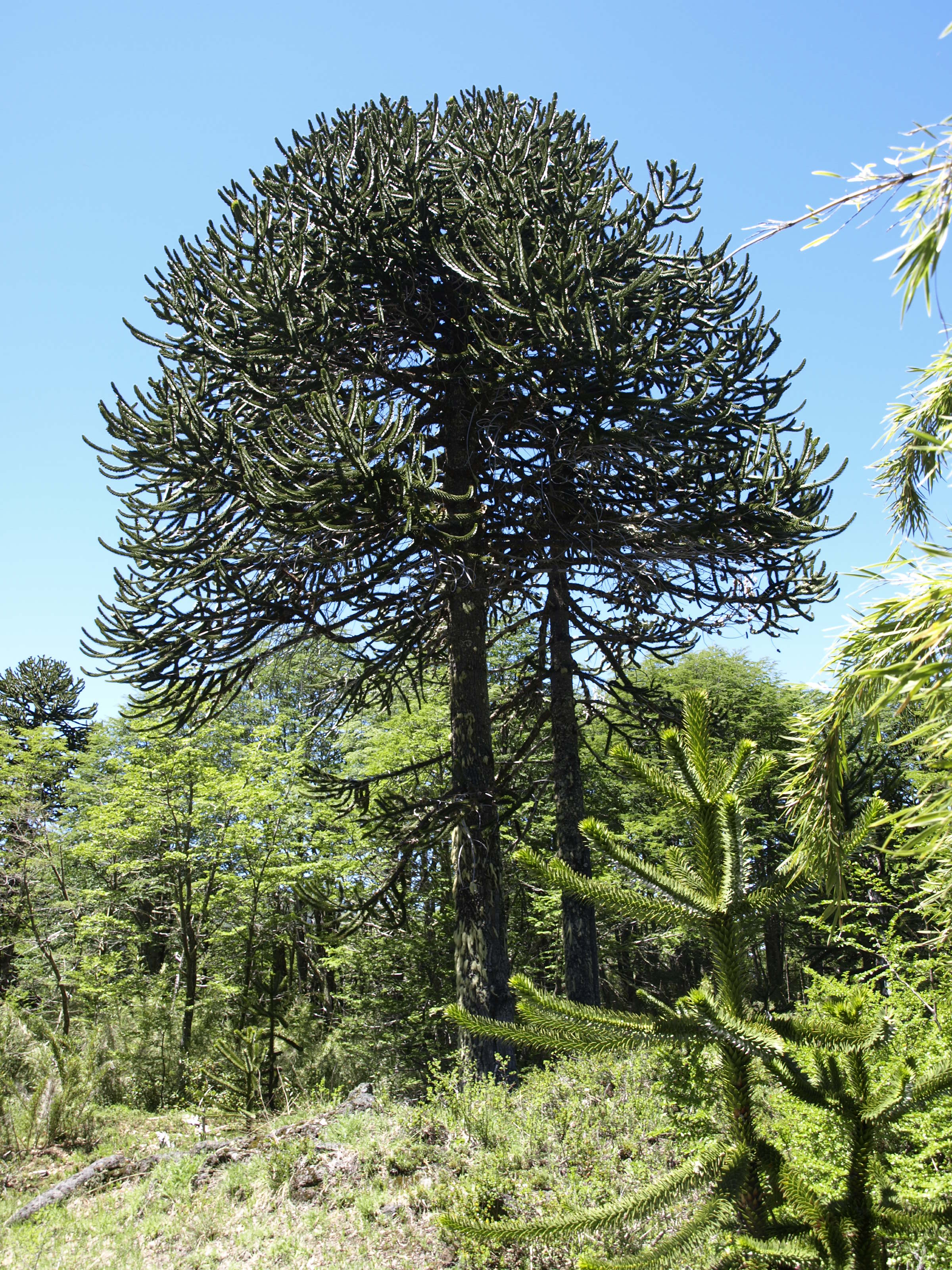 Araucaria araucana, Parque Nacional Villarica, Chile.